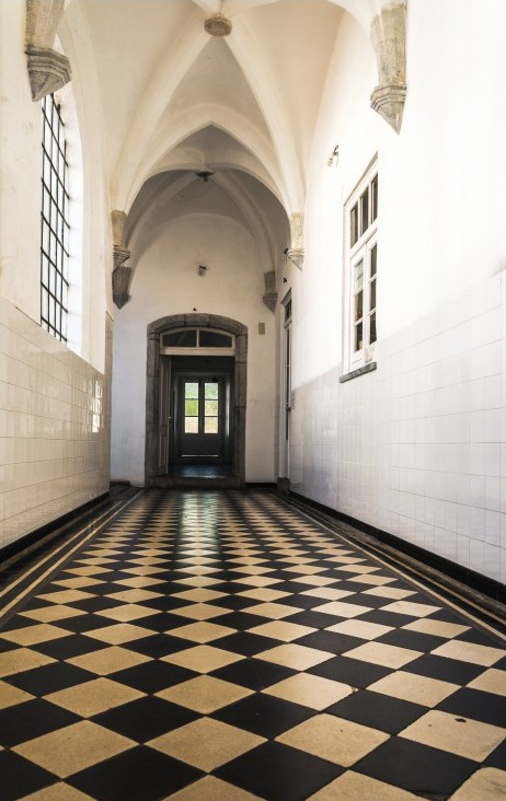 Hospital da Misericórdia, un edificio gótico de los siglos XV-XVI. Si cruzas el portal y zaguán ojivales, podrás visitar superficialmente el patio de entrada y el claustro interior, con cisterna en el centro.